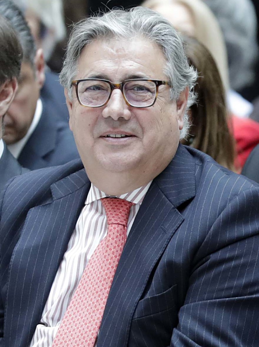 CIFUENTES, EN LA VII EDICIÓN DEL PREMIO ‘VERDAD, MEMORIA, DIGNIDAD Y JUSTICIA’La presidenta de la Comunidad de Madrid, Cristina Cifuentes, participa en la VII Edición del premio “Verdad, Memoria, Dignidad y Justicia” que organiza la Asociación de Víctimas del Terrorismo (AVT).Foto. D. Sinova